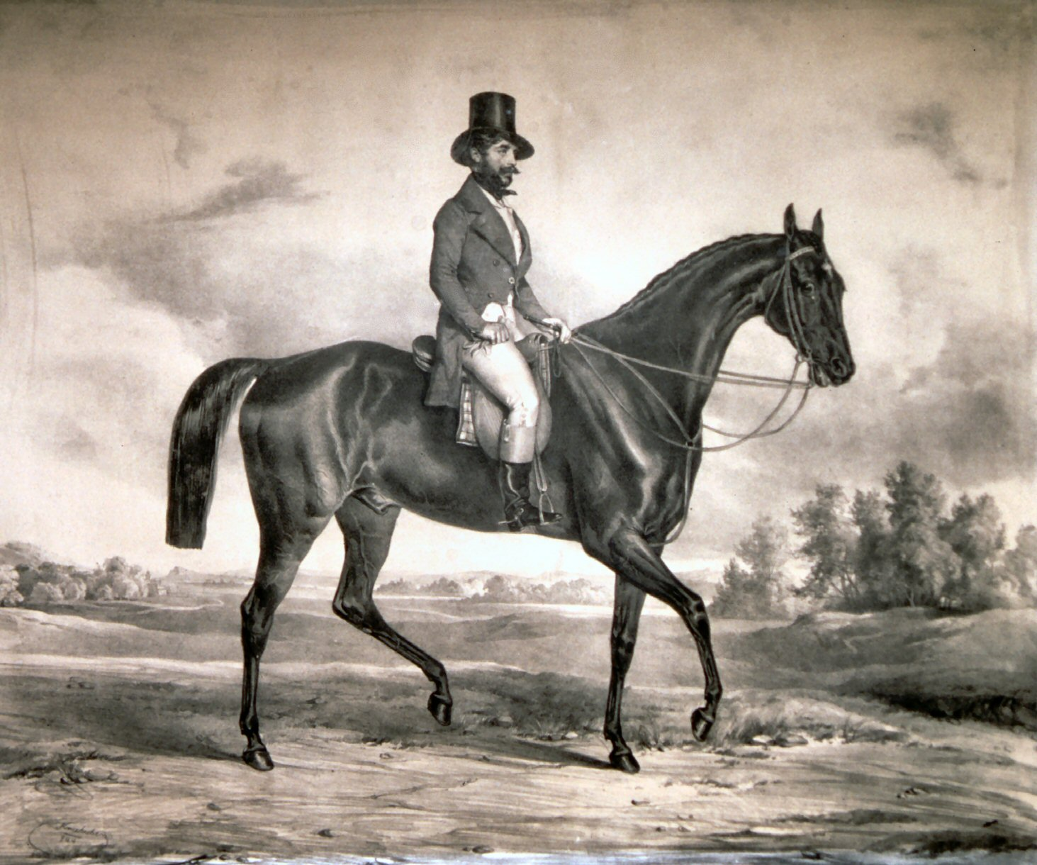 Moritz Graf Sándor (1895-1878), Pferdezüchter, berühmter Reiter. Lithographie von Josef Kriehuber, 1844